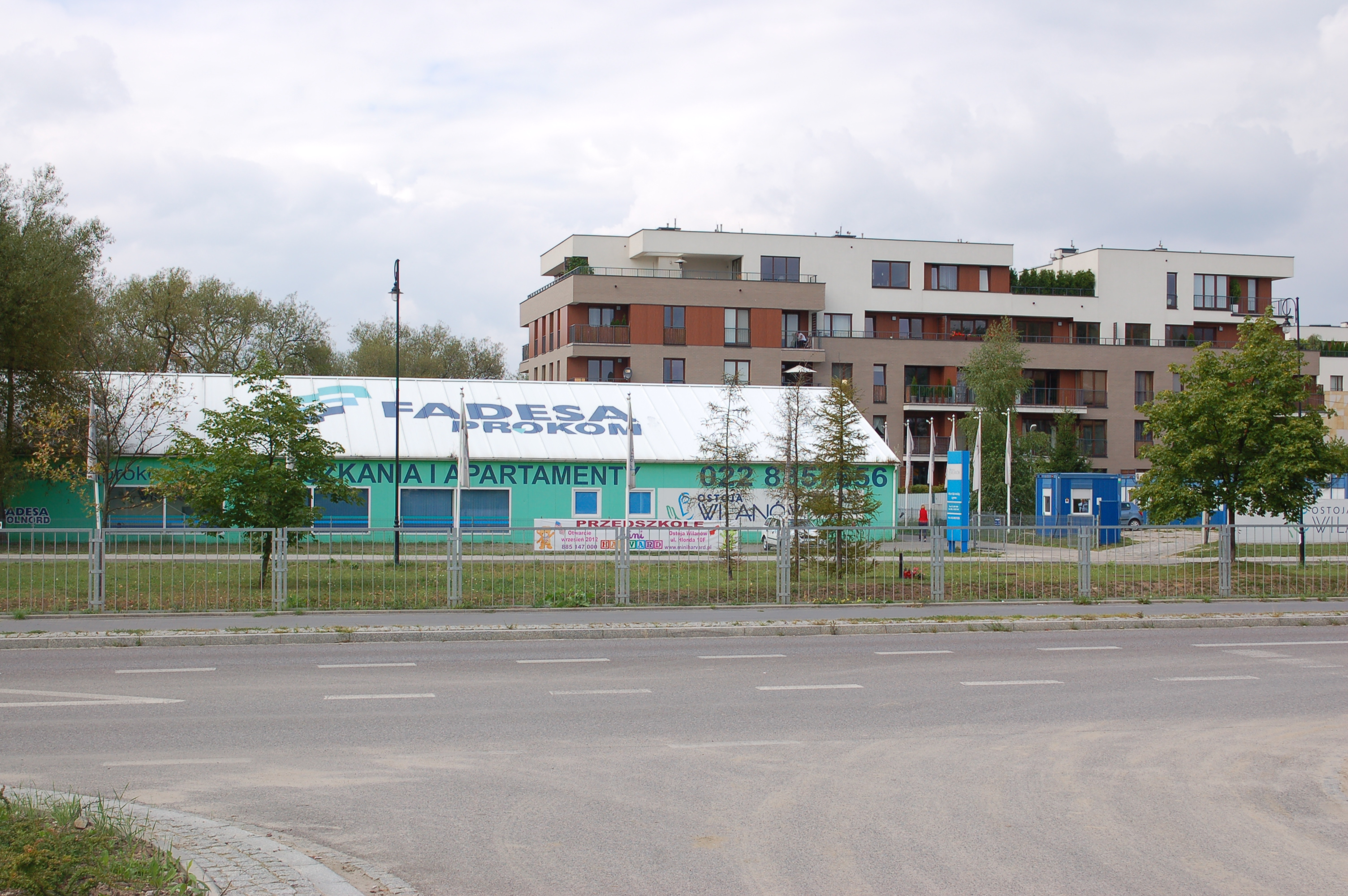 WilanówMiasteczko